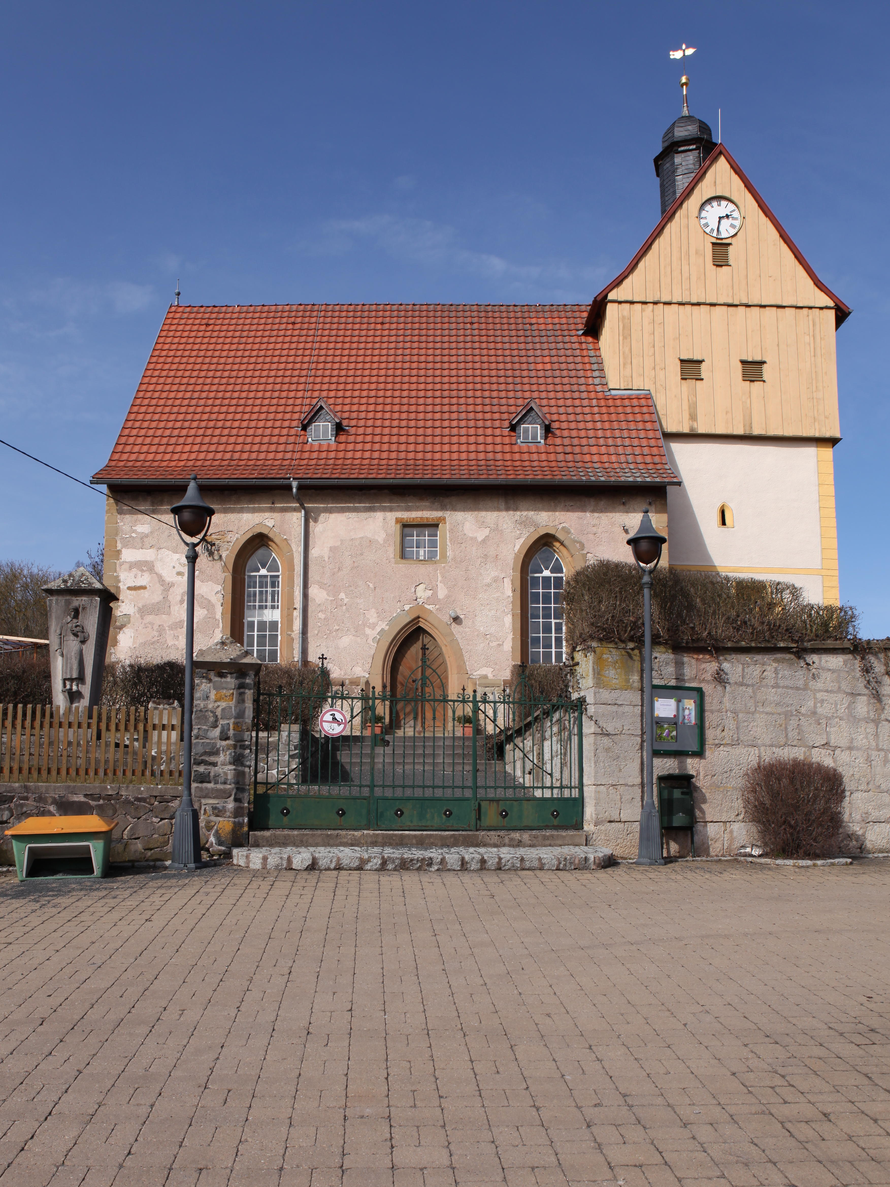 Evangelisch-Lutherische Kirche St. Marien in Roth bei Gleichamberg, OT von Römhild, Landkreis Hildburghausen